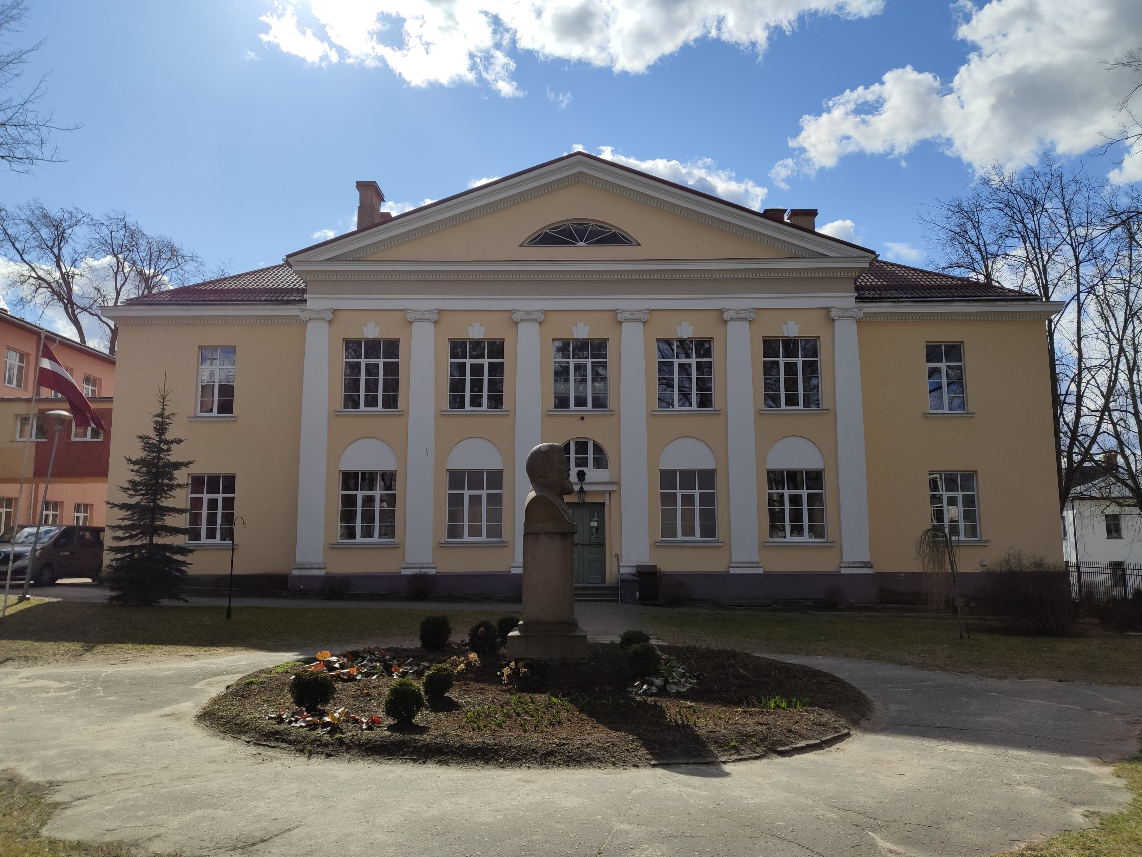 Valmieras Valsts kurlmēmo skolas ēka (celta 1929. gadā). Tagad Valmieras Gaujas krasta vidusskolas – attīstības centra centrālā ēka. Attēlā redzama arī skolas dibinātāja Vīlipa Švēdes skulptūra (tēlnieks Vilhelms Treijs).